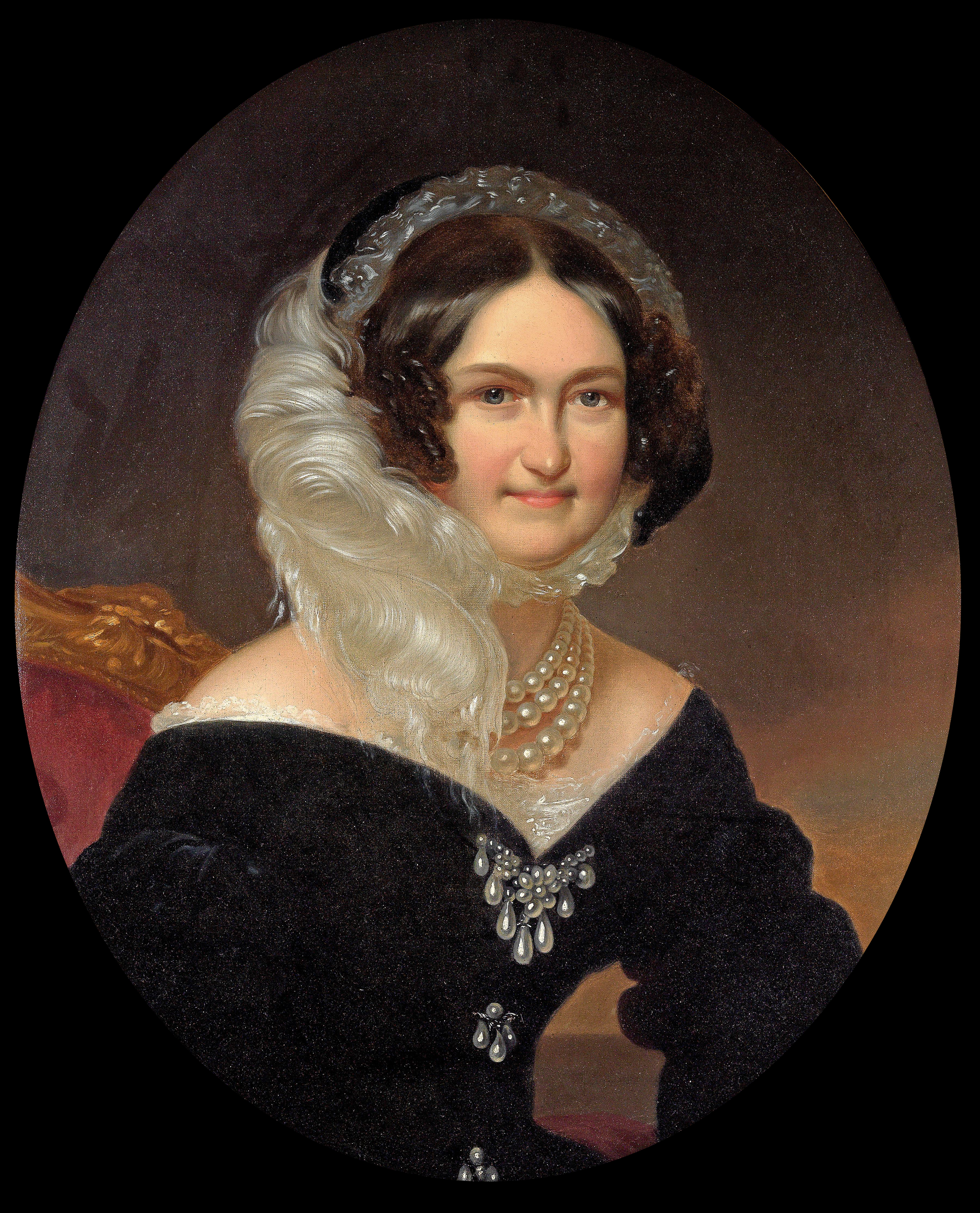 Kaiserin Carolina Augusta von Österreich, Porträt der Kaiserin mit schwarzem Kleid und Perlenschmuck, Öl auf Leinwand, 65 x 53 cm